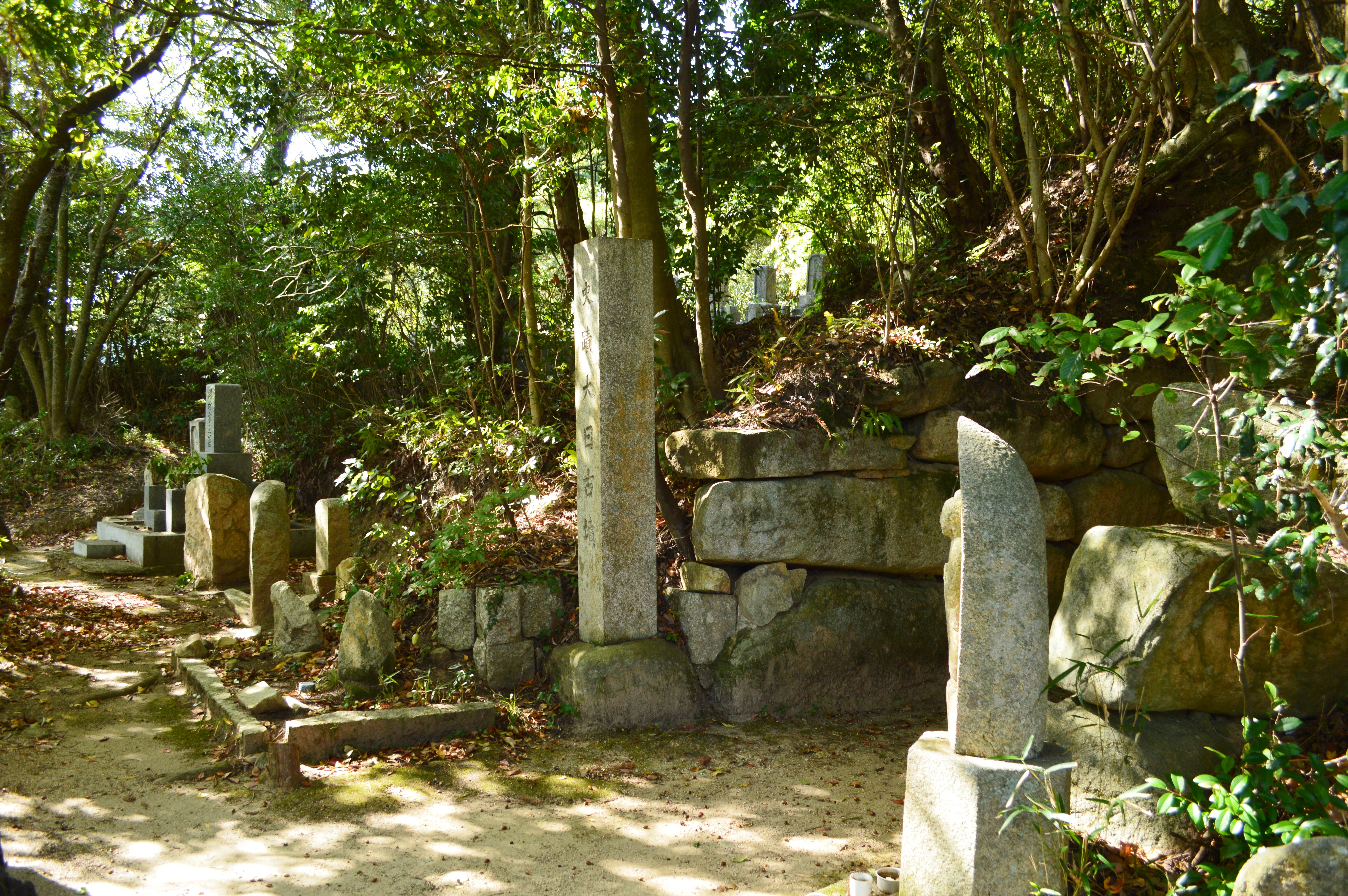 大日古墳 墳丘